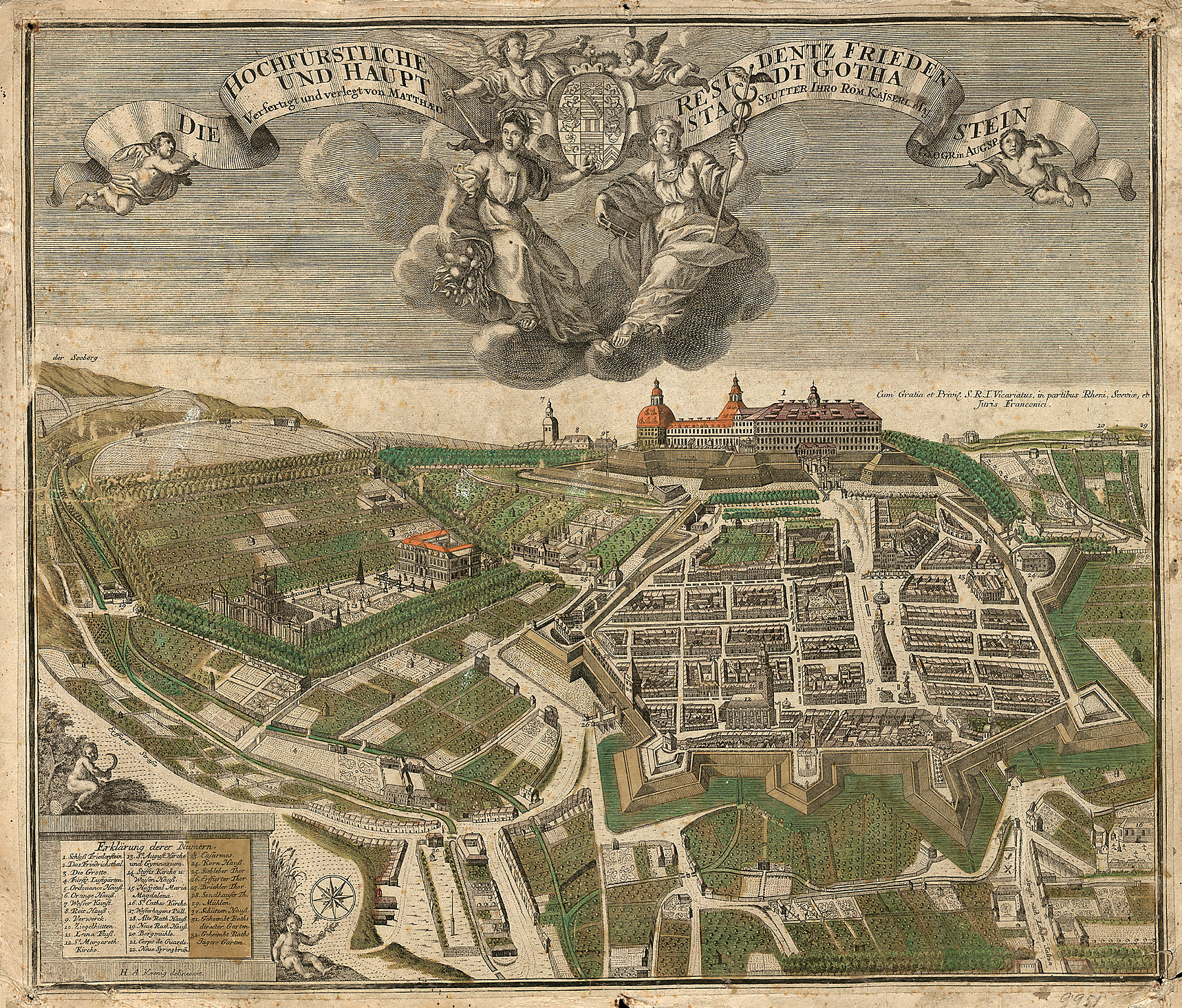 Die hochfürstliche Residentz Friedenstein und Hauptstadt Gotha Kupferstich (kol.); 18. Jh., verlegt von Matth. Seutter